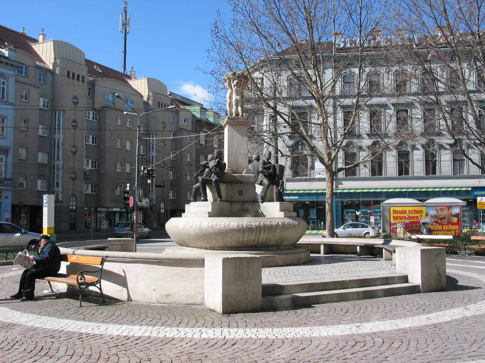 Alszauberbrunnen auf dem Elterleinplatz in Wien Alszauber fountain on Elterleinplatz in Vienna